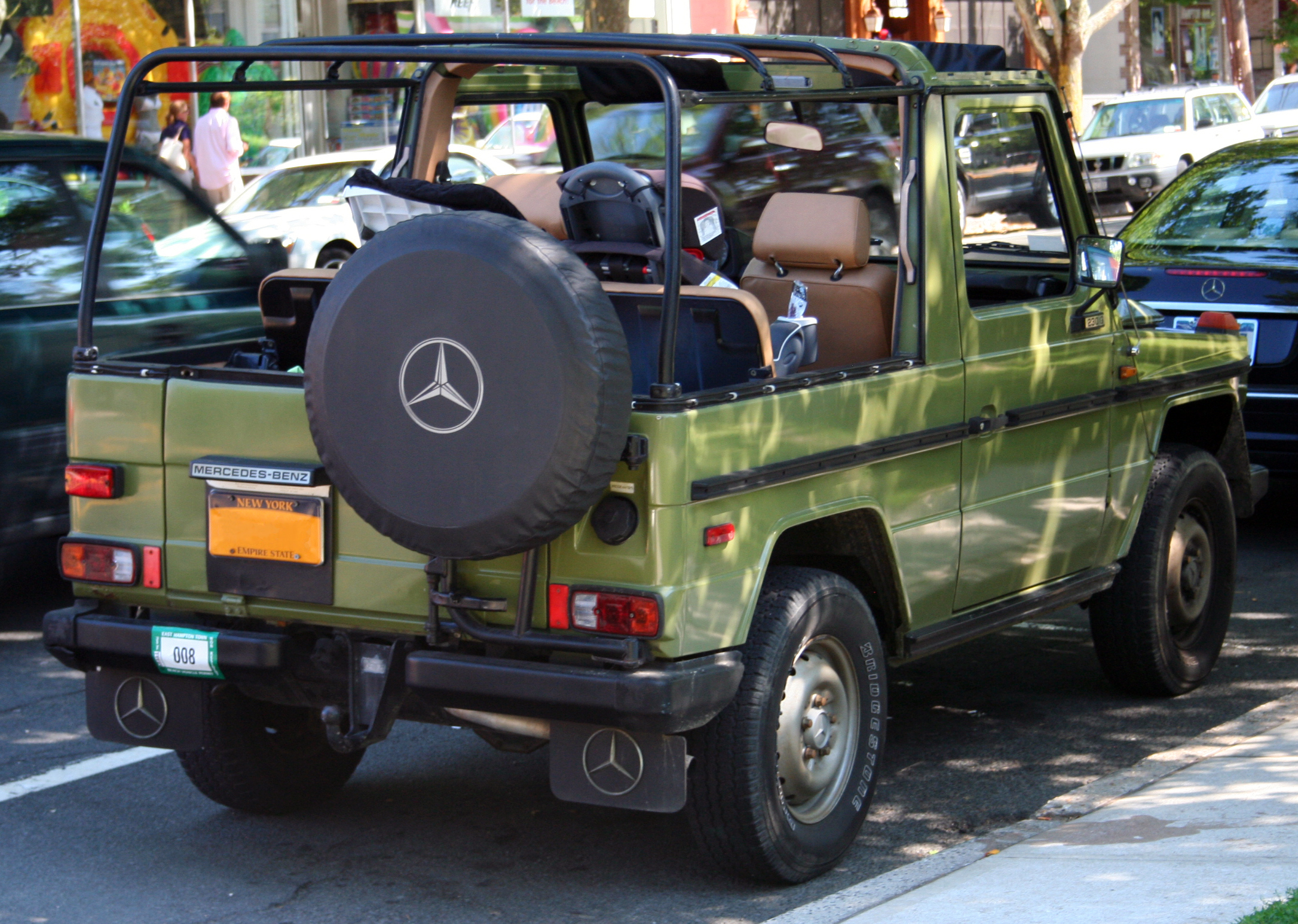 1979-1982 Mercedes-Benz 230G Cabriolet